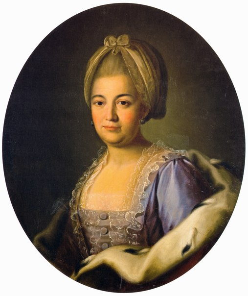 Princess Varvara Ivanovna Trubetskaya (?), née Odoyevskaya (+1788)